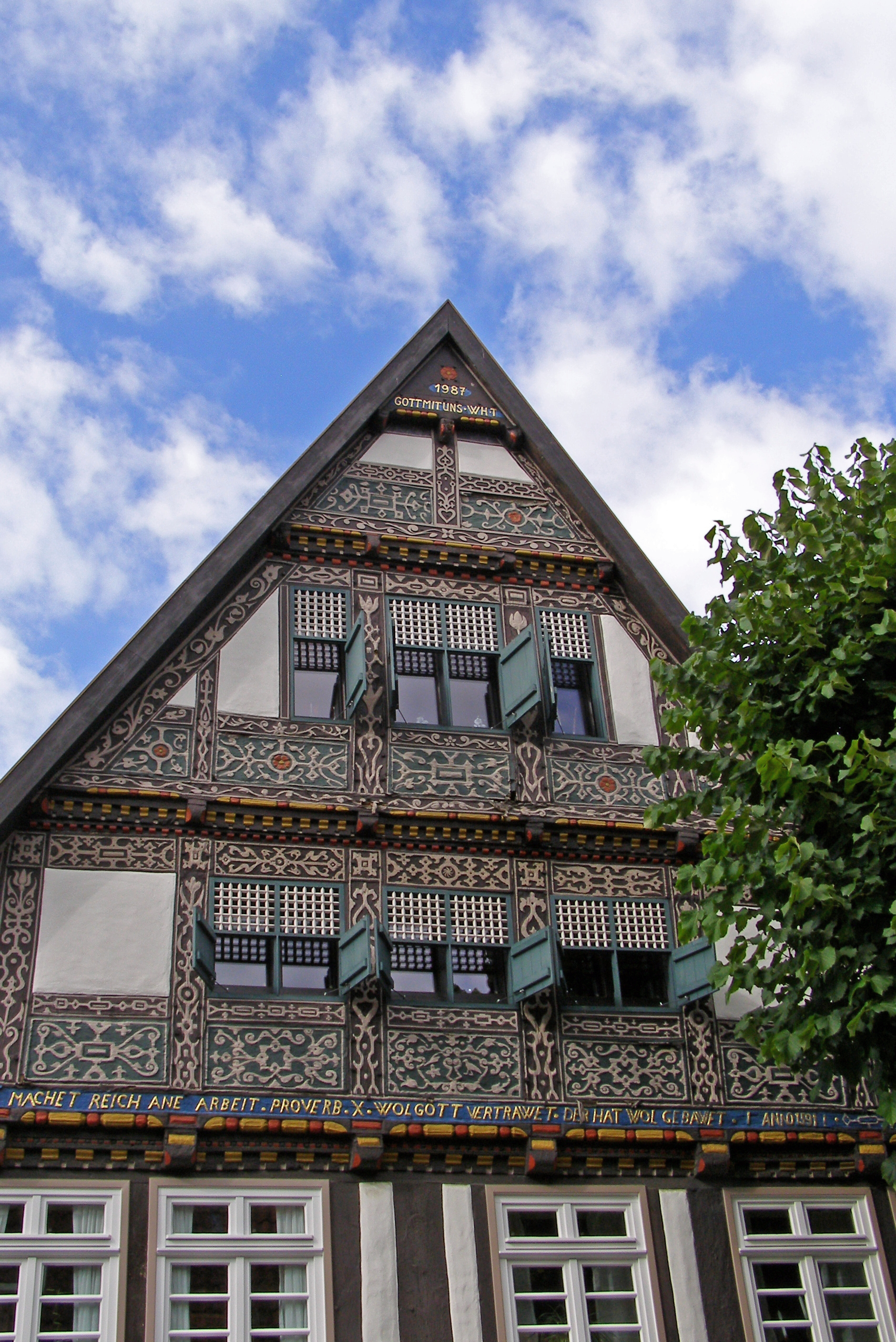 Lemgo, Altes Backhaus, Giebel